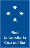 Logo Red Universitaria Cruz del Sur